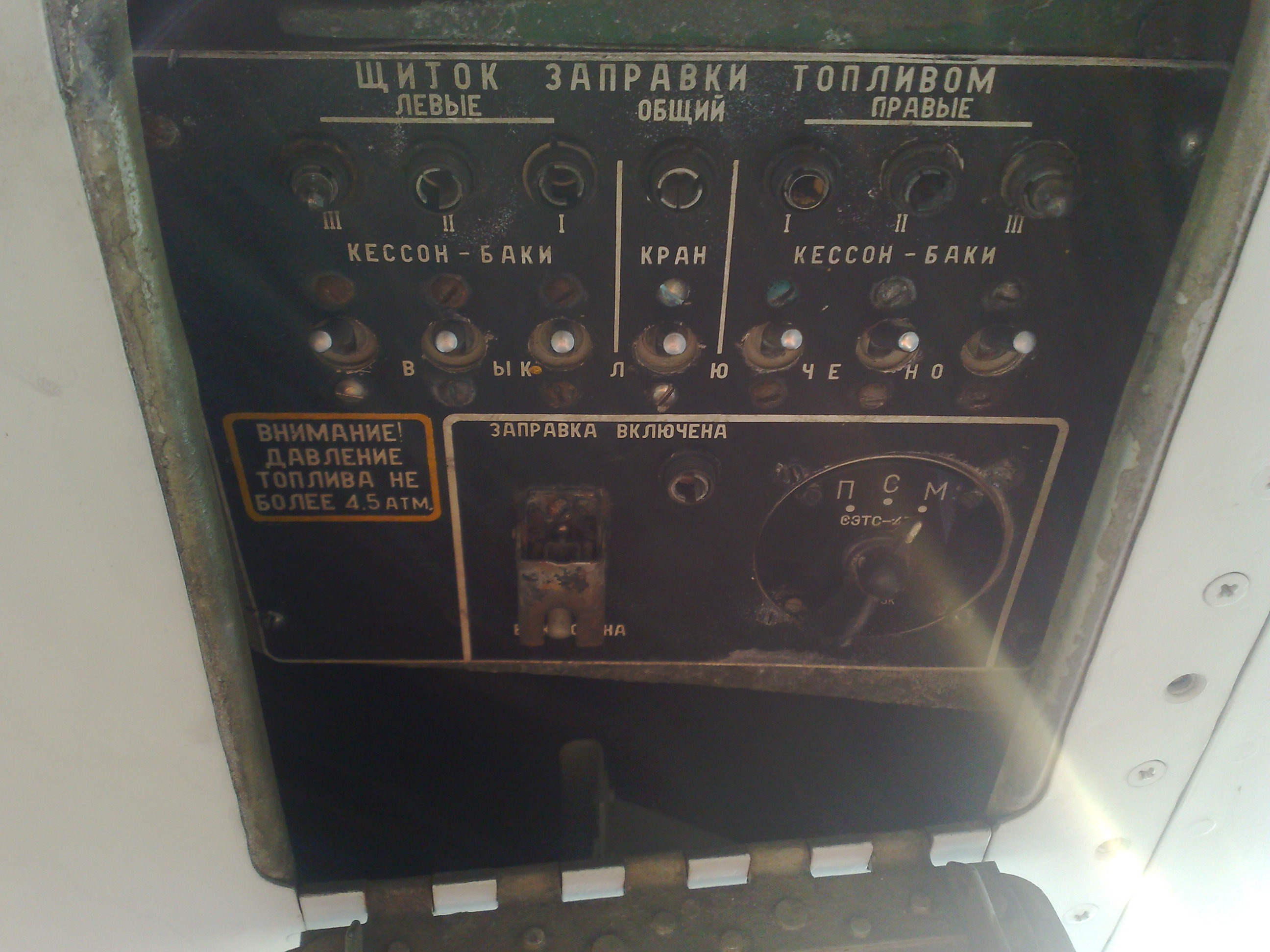 Щиток заправки топливом самолета ТУ-134А, находящегося неподалеку от аэропорта Ижевска